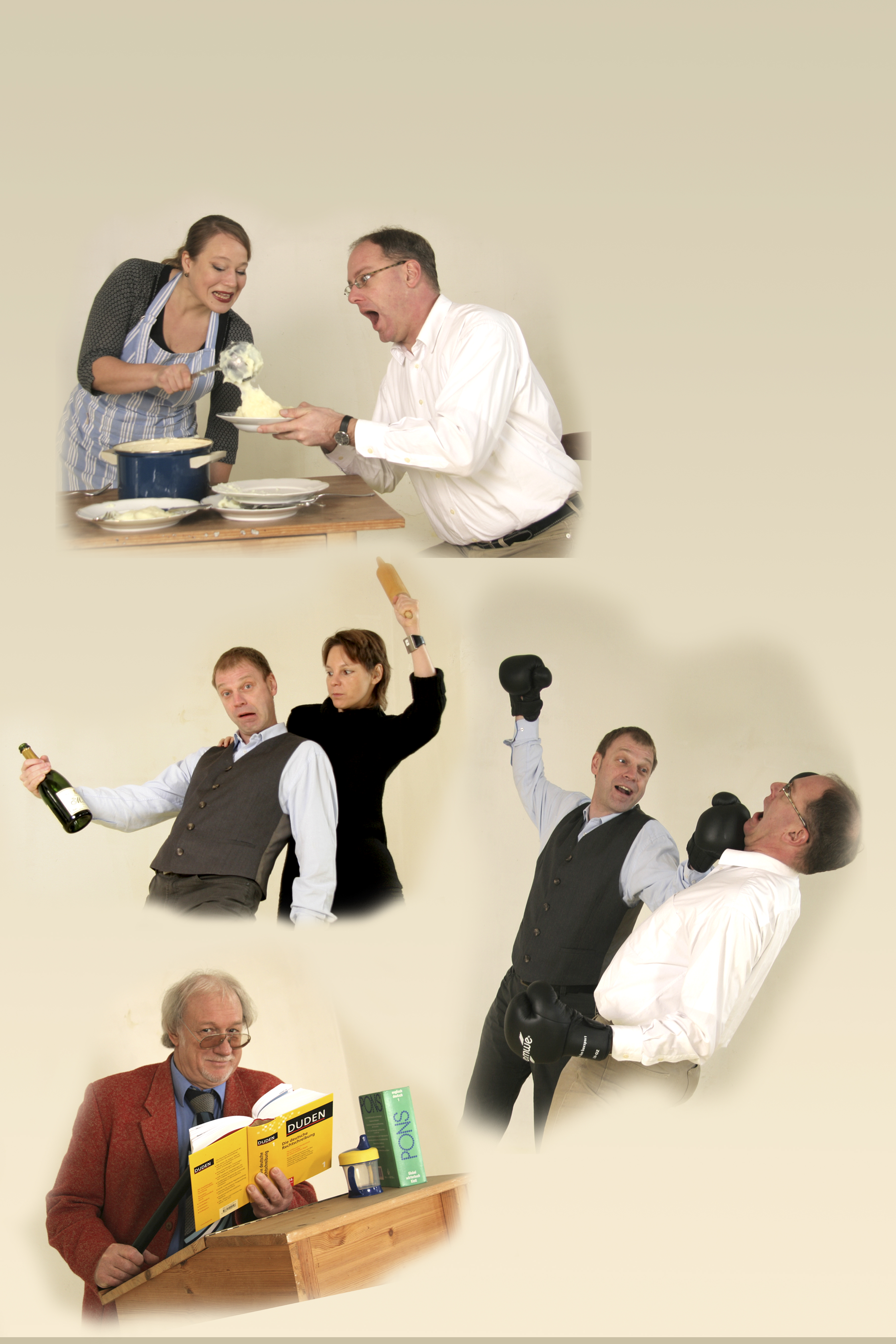 GAUwahnen Collage "Kabarettisten in Aktion"